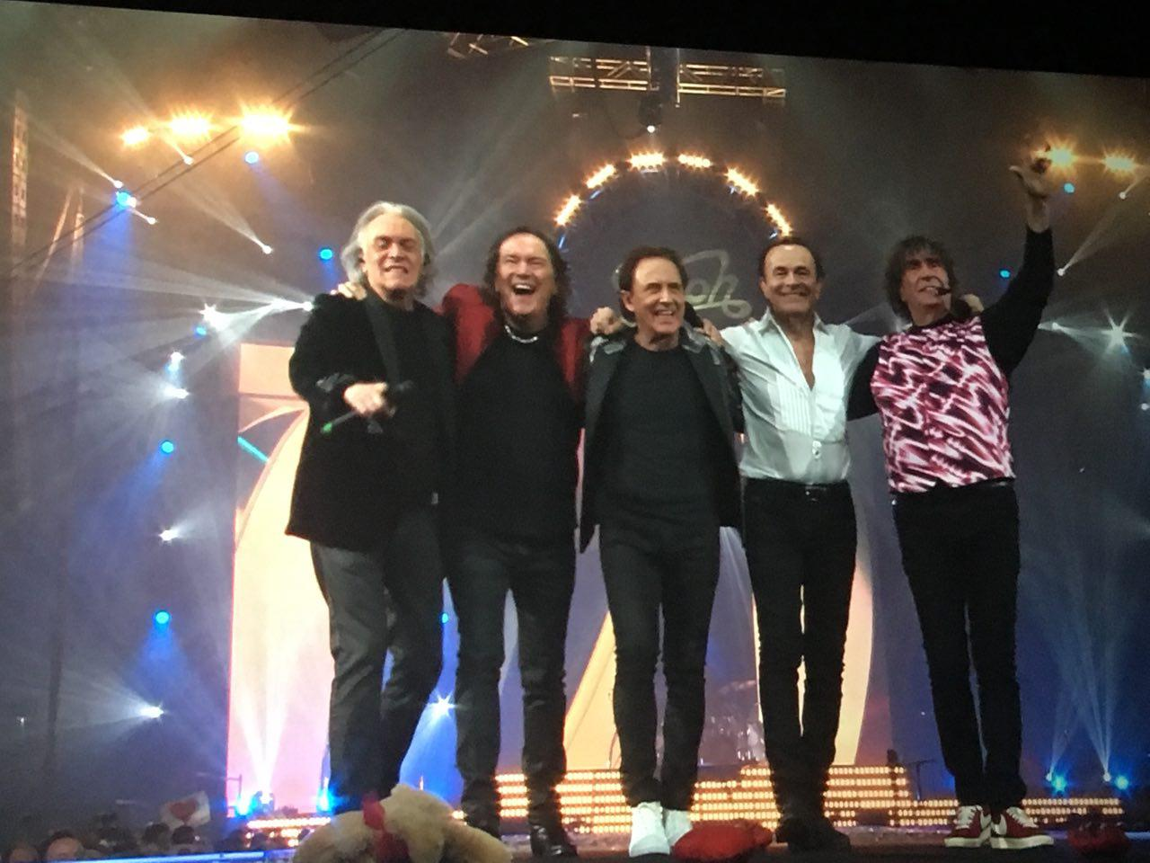 Saluto Pooh al pubblico di tutta Italia in diretta su RTL 102.5